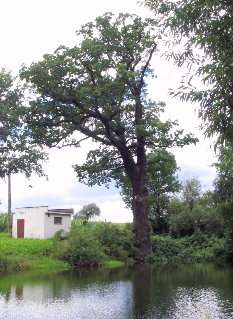 Krausův dub.